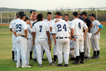 Beit Shemesh Blue Sox Team Huddle